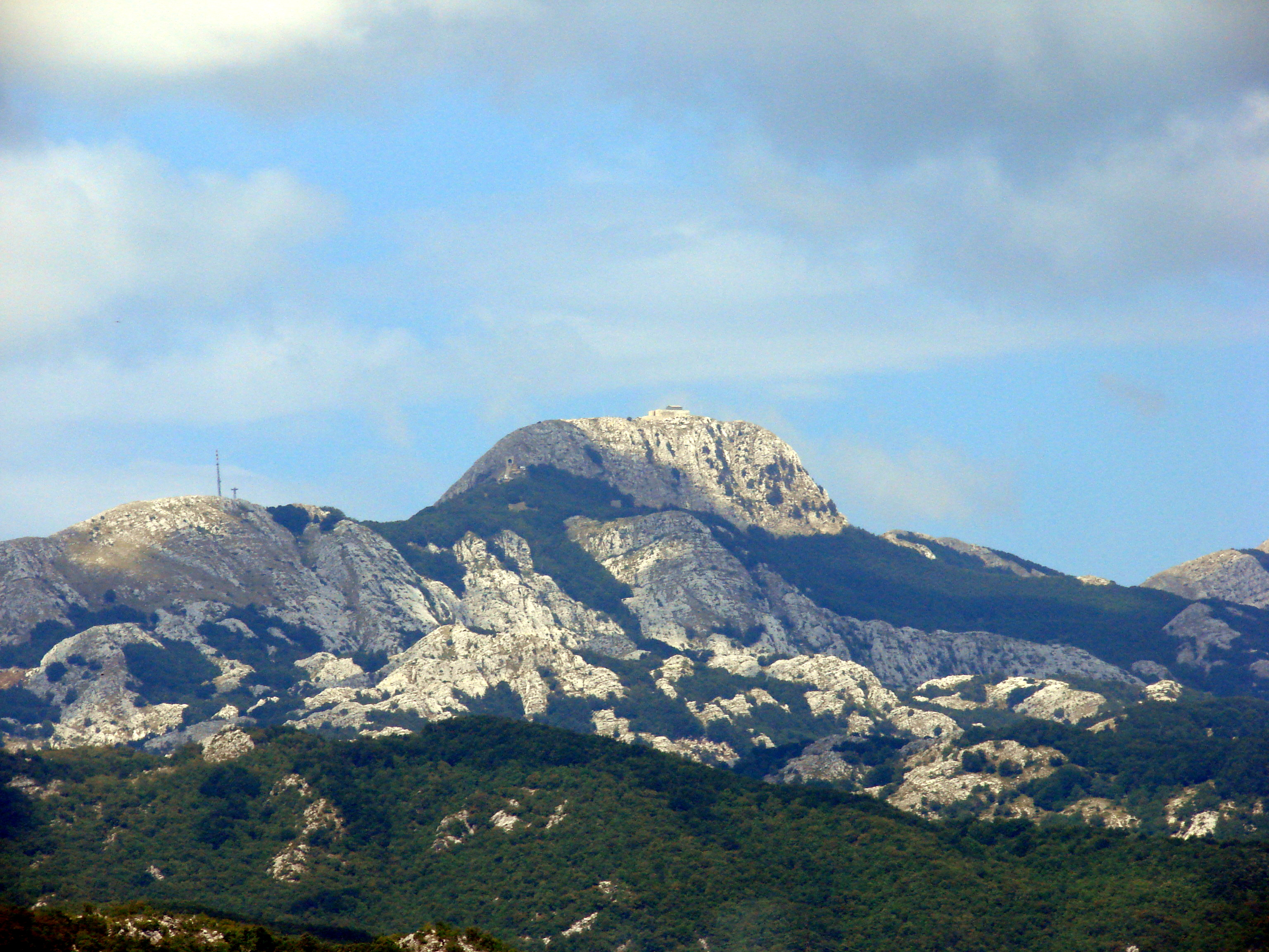 Ловчен. Мавзолей Петра II Негоша